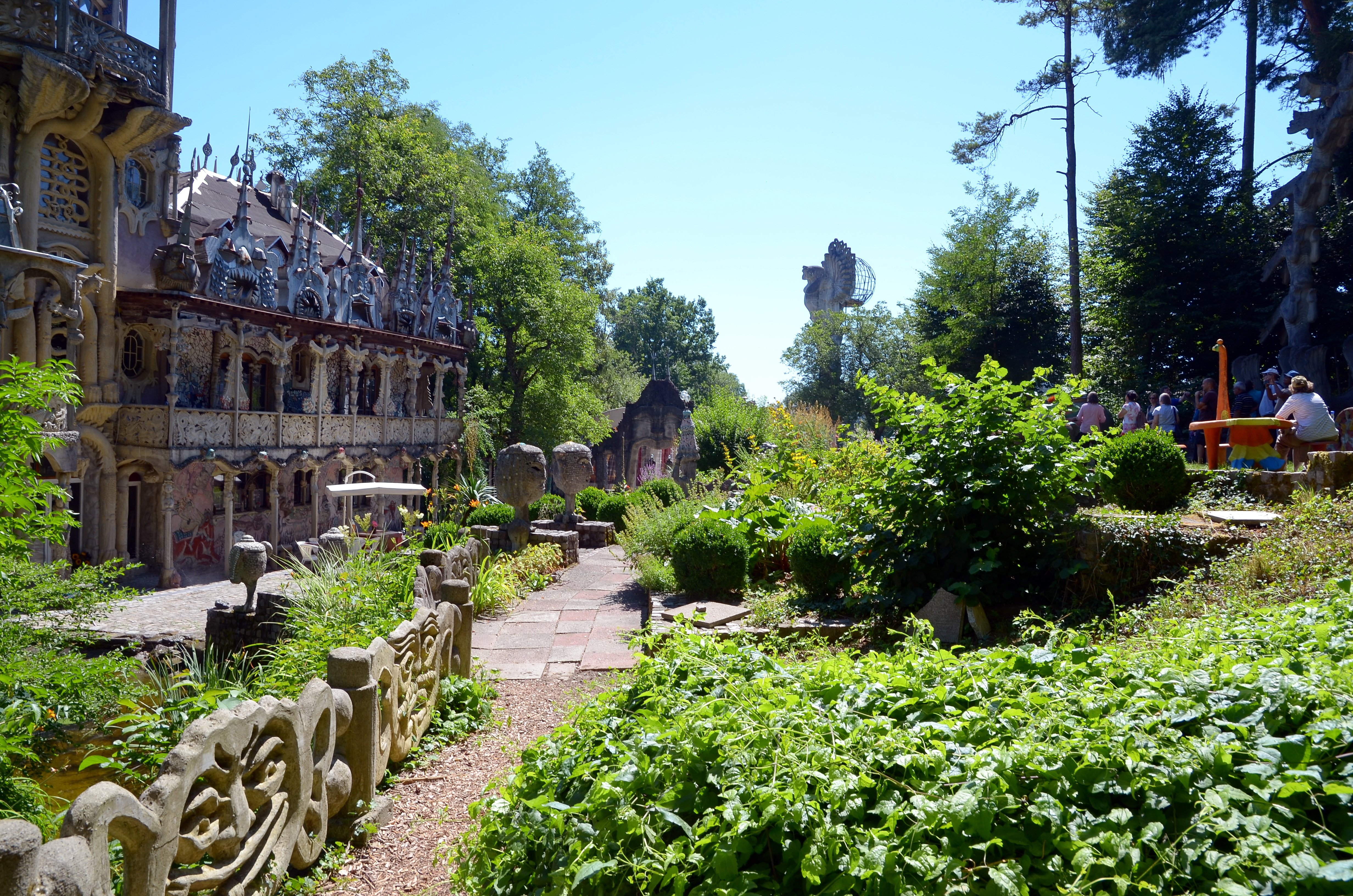 Bruno Weber Skulpturenpark in Dietikon - Spreitenbach (Switzerland)